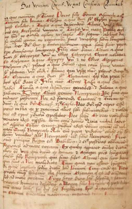 Béldi-kódex egyik lapja